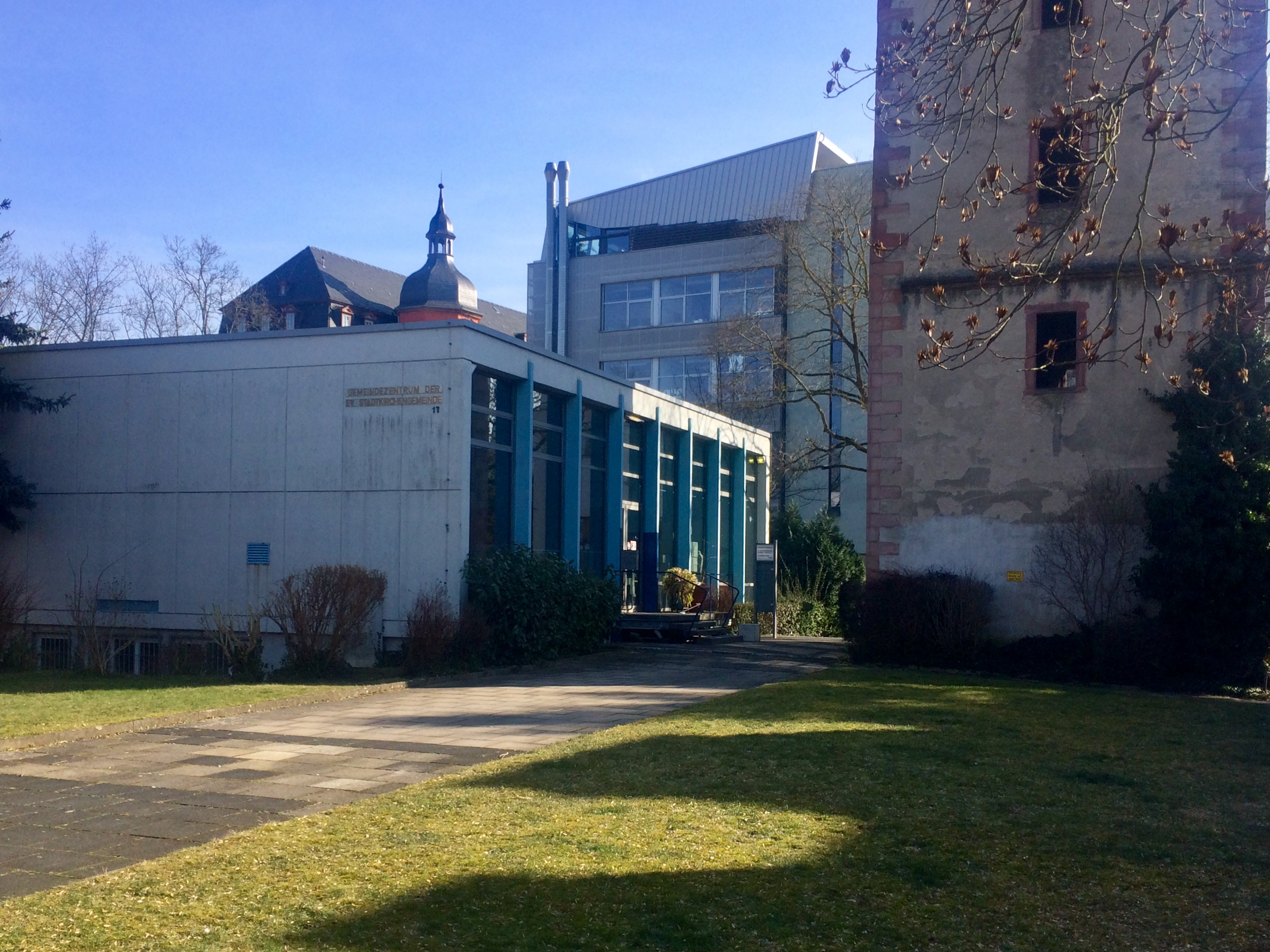 Gemeindehaus der Stadtkirche Offenbach am Main auf dem Gelände der historischen Schlosskirche